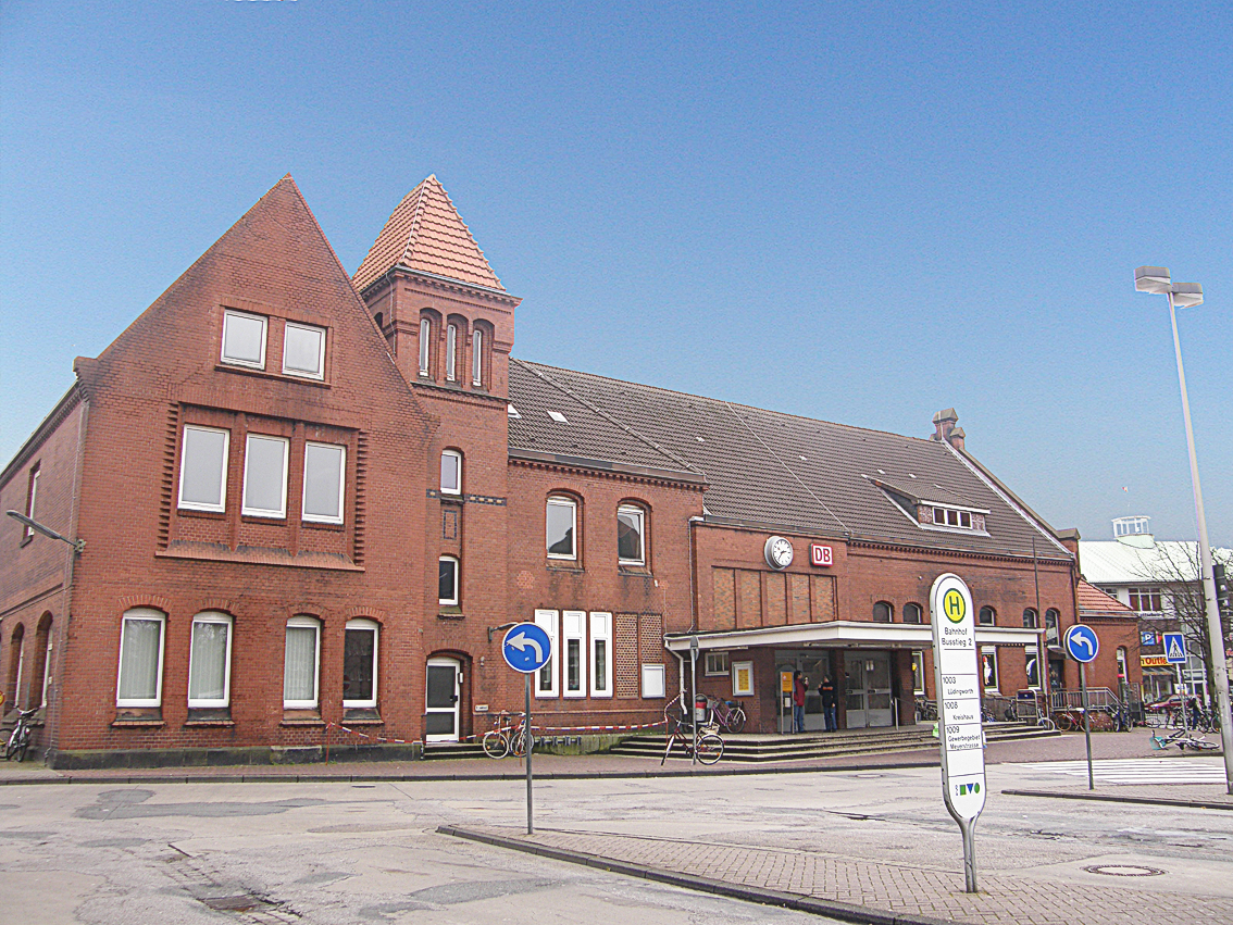 Der Cuxhaven Bahnhof von der Westseite gesehen